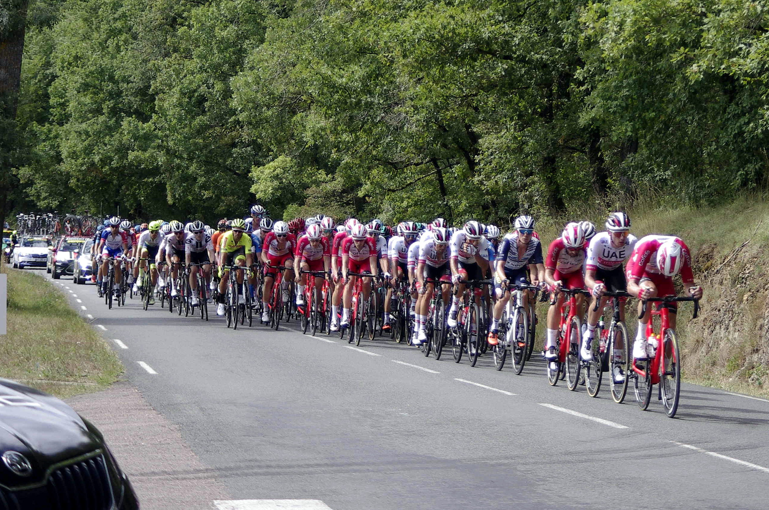 Tour du Limousin 2020. Traversée de Javerlhac en Dordogne